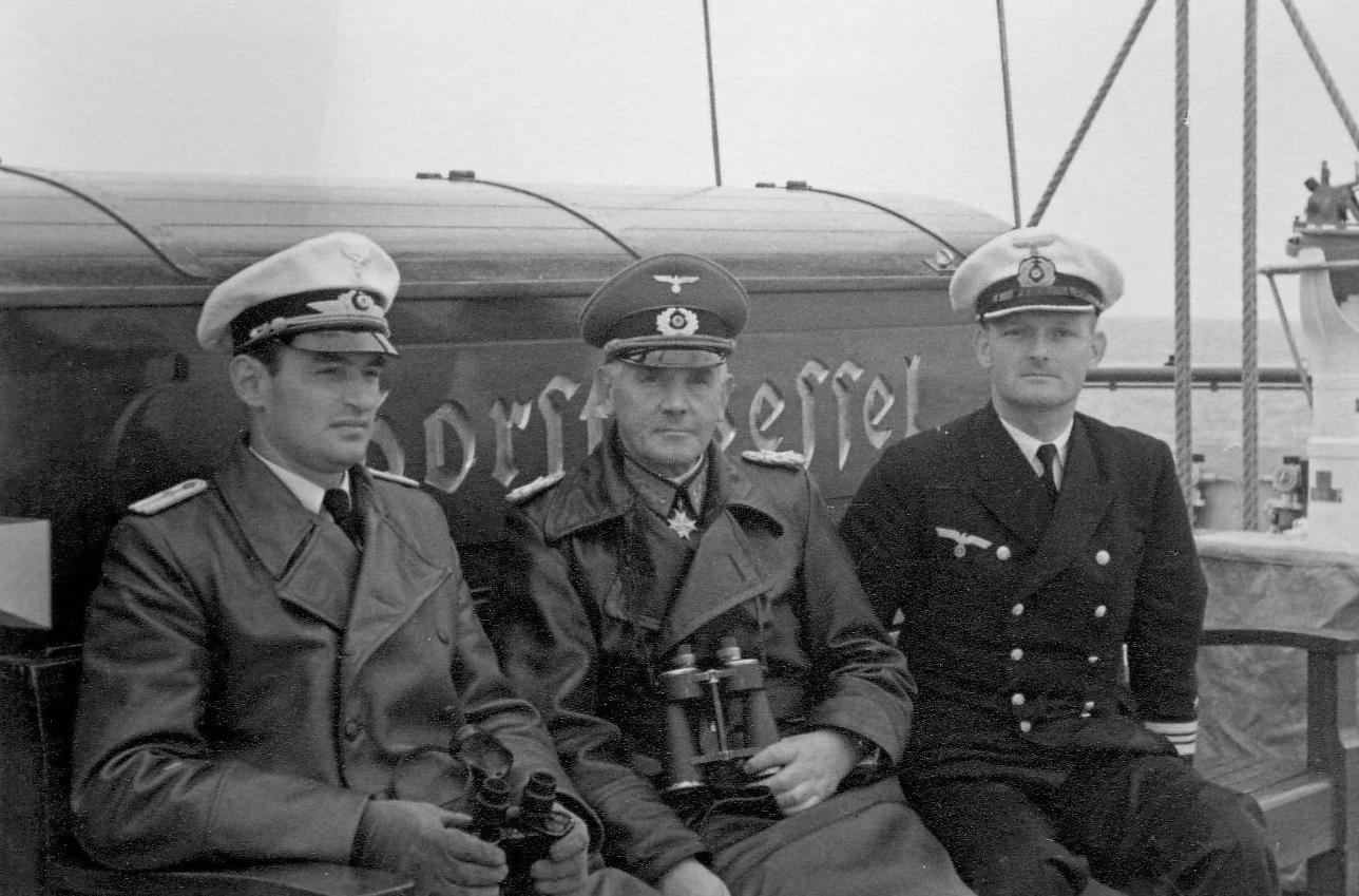 Besuch auf der Horst Wessel. Personen von links nach rechts: unbekannt, Kriegsminister Generalfeldmarschall Werner von Blomberg und Blombergs Marineadjutant Kapitänleutnant Hubert von Wangenheim